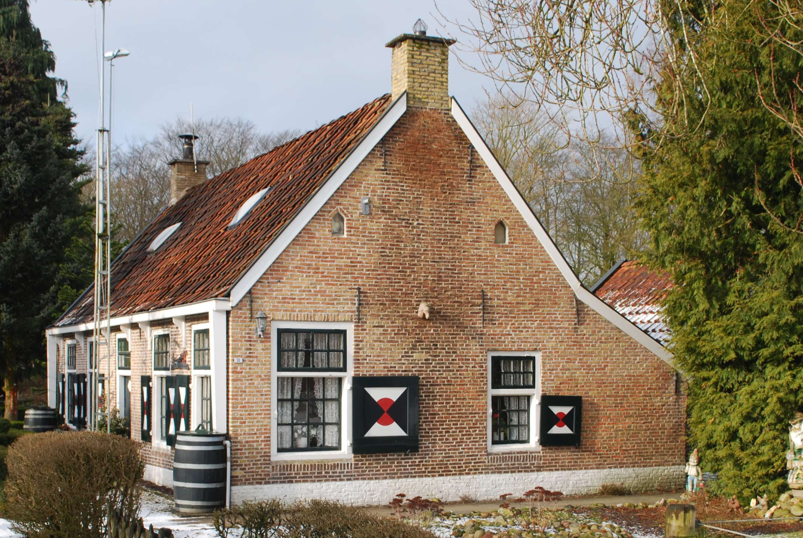 Rijksmonument Boerestreek 18 in Appelscha